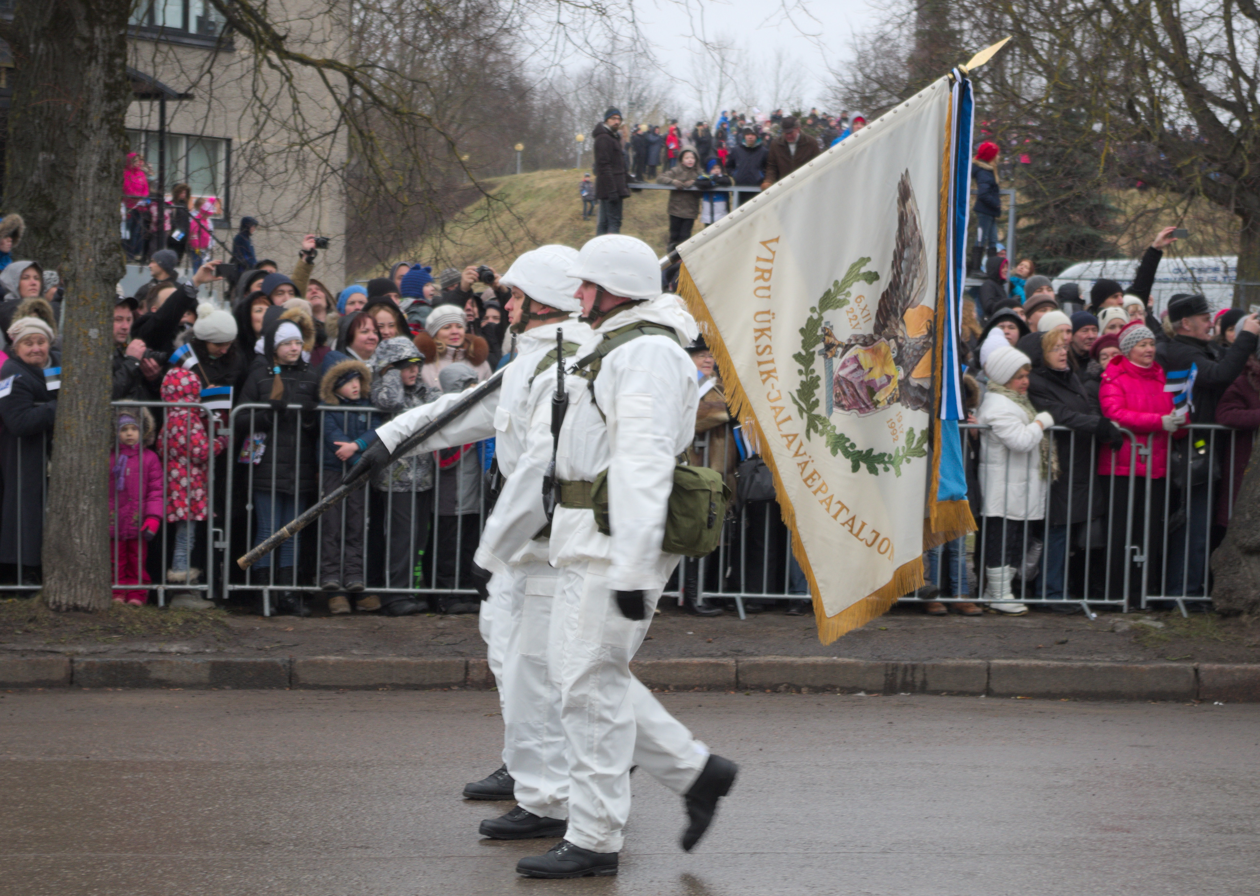 Viru üksik-jalaväepataljoni lippurid Vabariigi aastapäeva paraadil Narvas, 2015